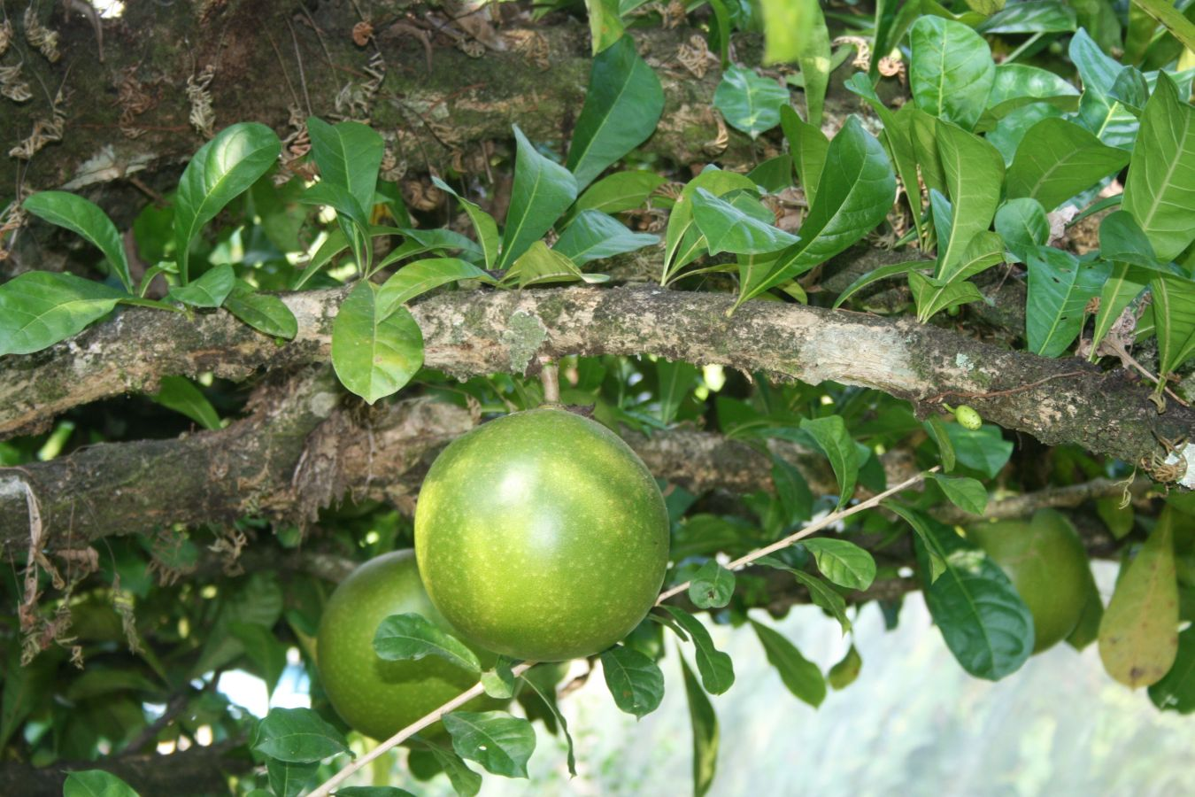 Crescentia cujete, Trompetenbaumgewächse (Bignoniaceae) - Costa Rica: Prov. Puntarenas, Hacienda Barú NW Dominical